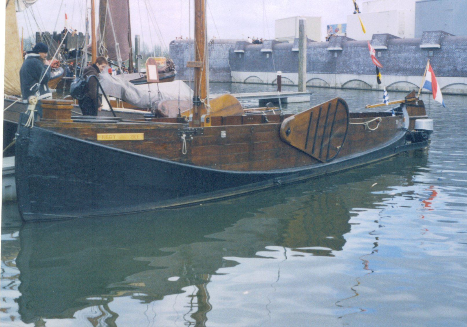 eigen foto Categorie:Afbeelding schip